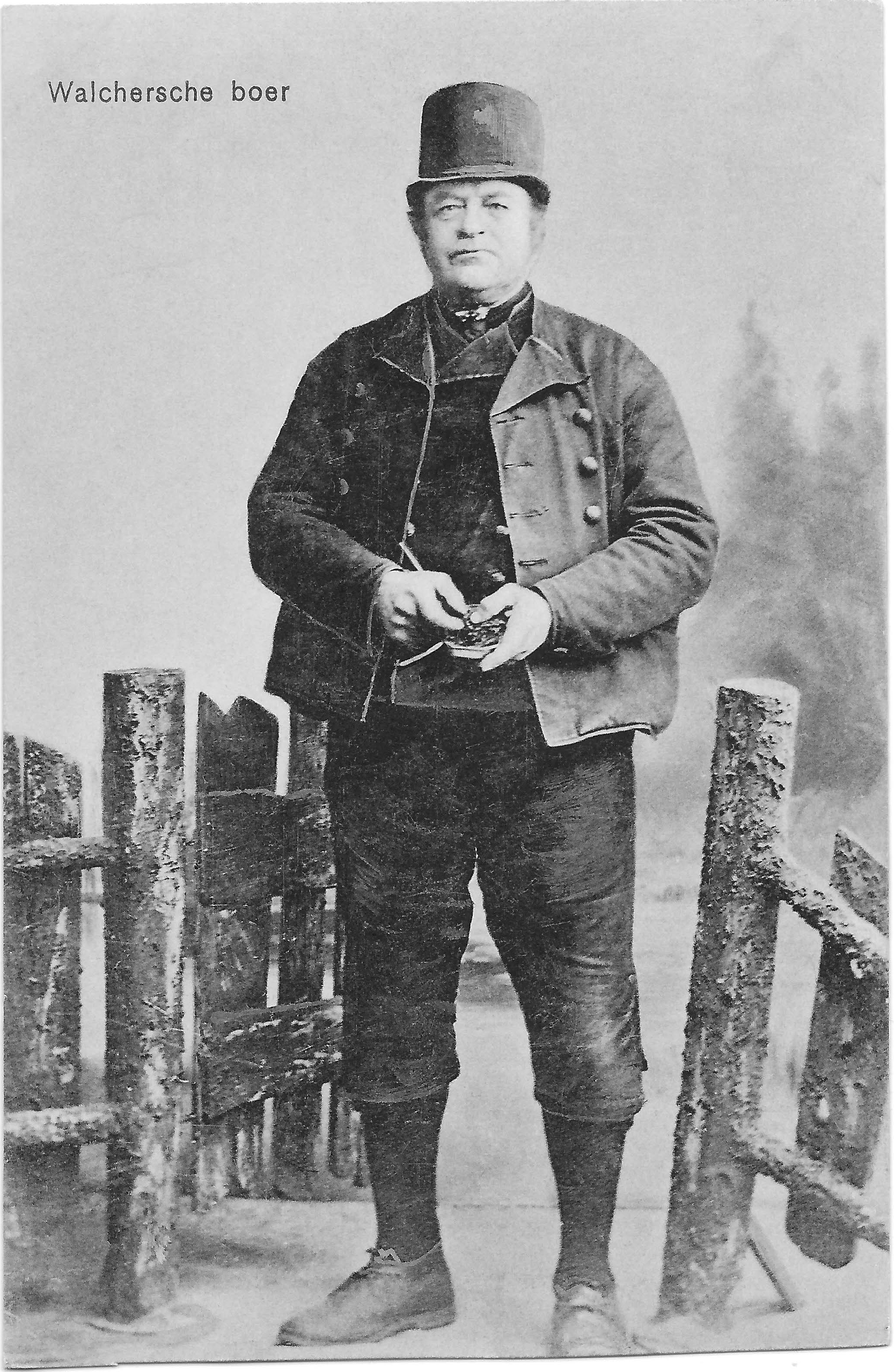 Briefkaart van een Walchersche boer